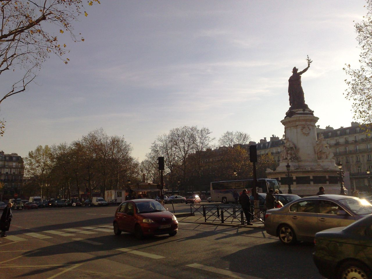 Place de la République, Paris